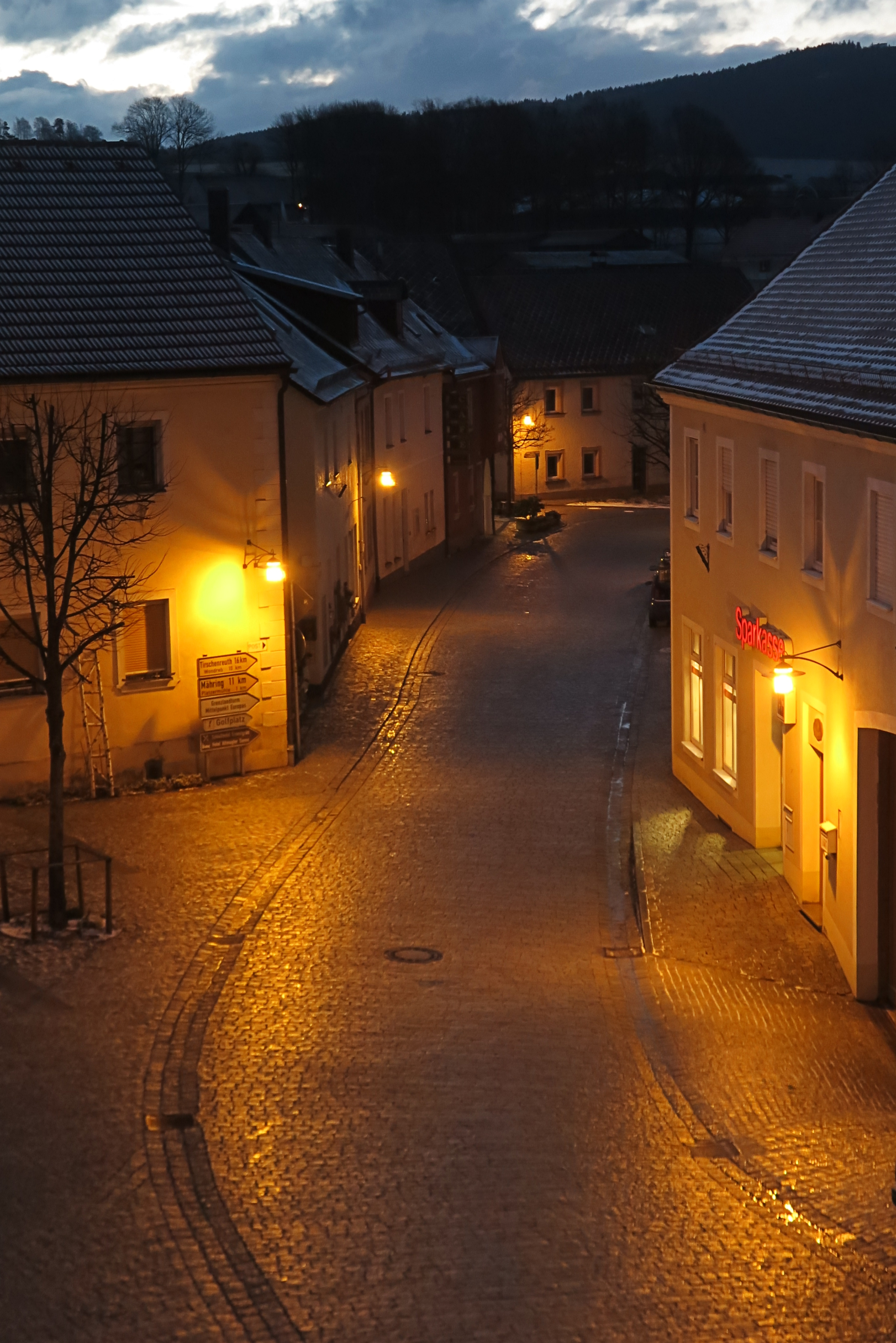 Deutschland, Bayern, Oberpfalz, Landkreis Tirschenreuth, Gemeinde Neualbenreuth, Marktplatz im Morgengrauen